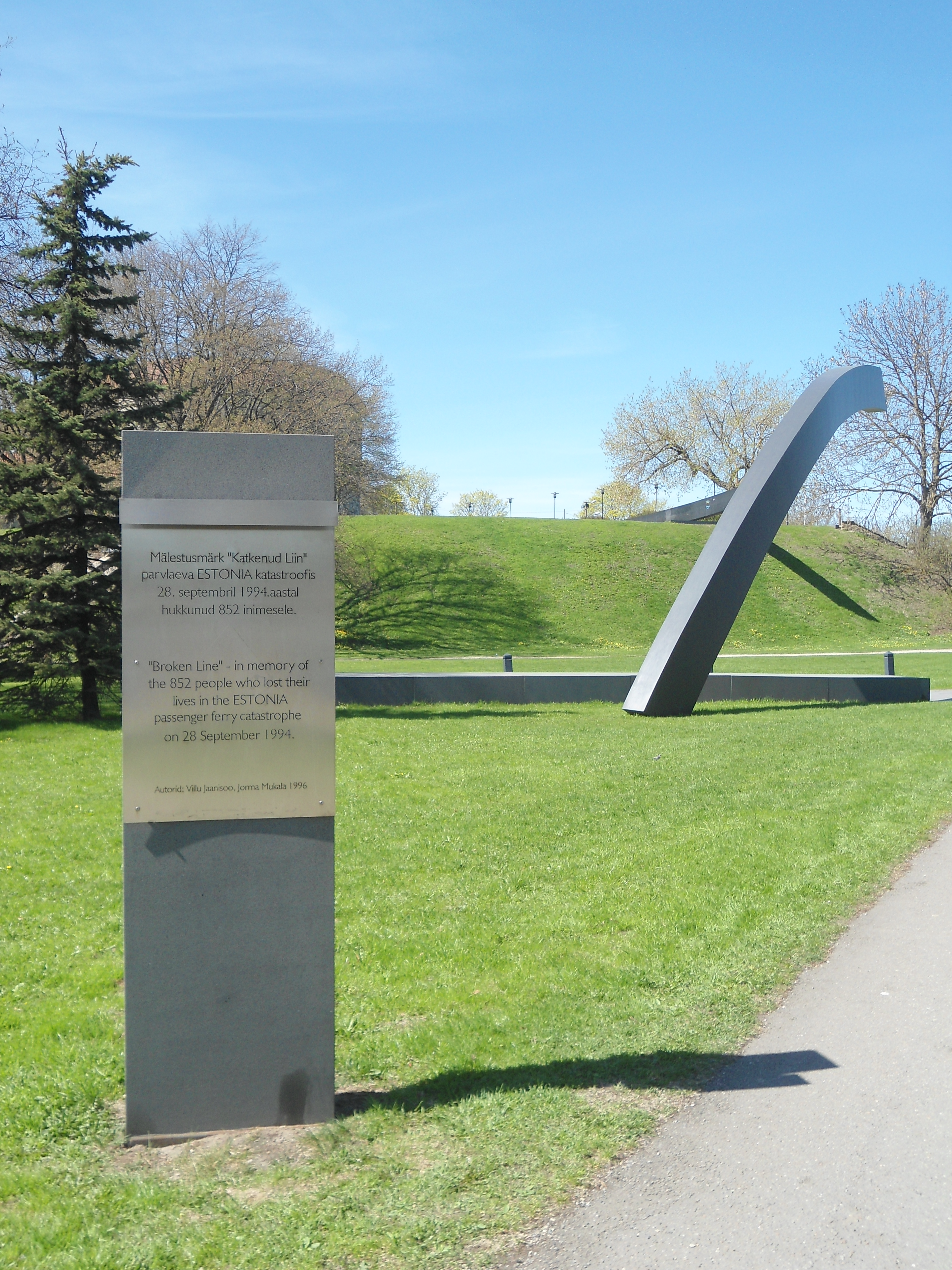 MS Estonia memorial